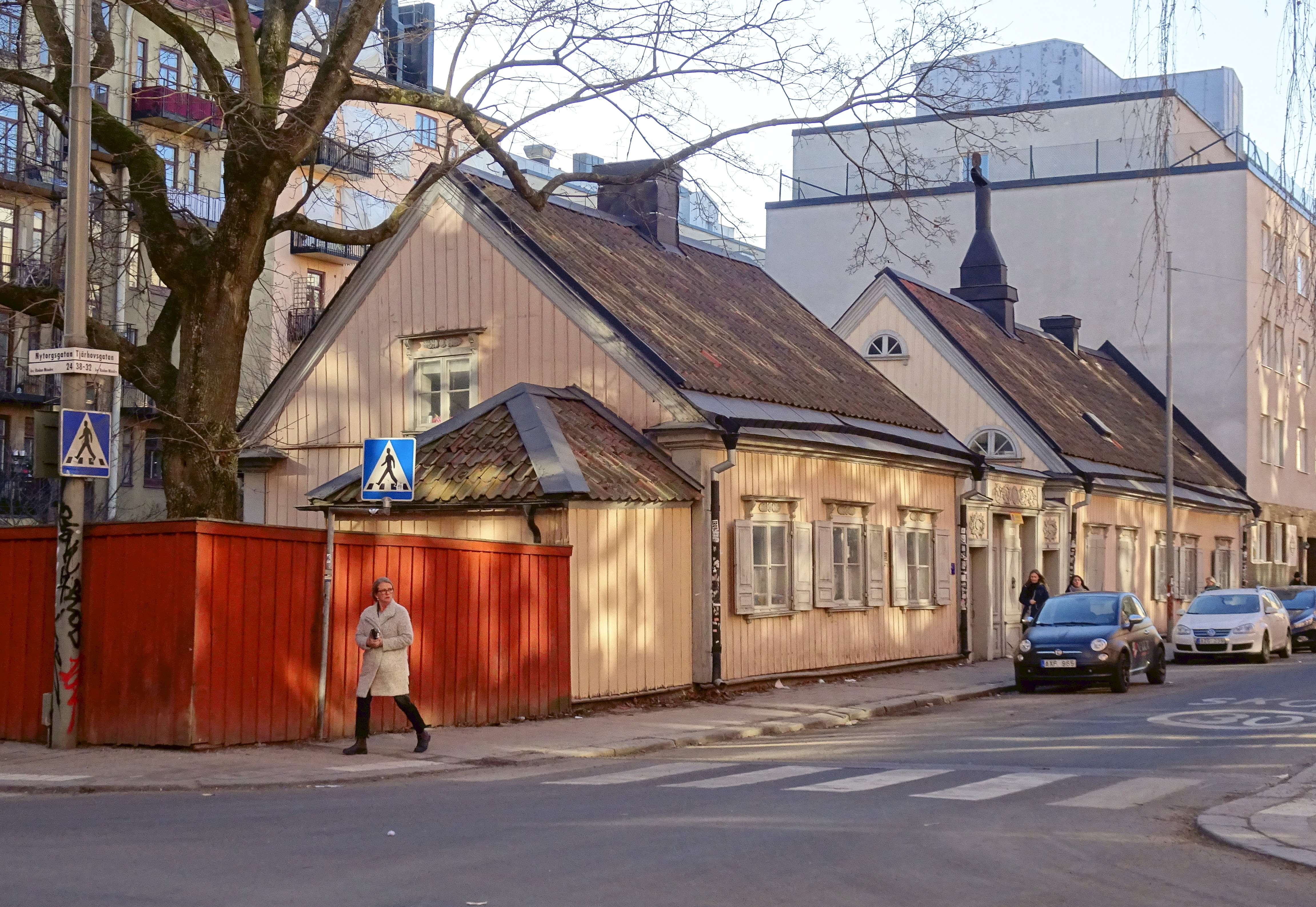 Törnquistska slaktargården, Tjärhovsgatan 36-38